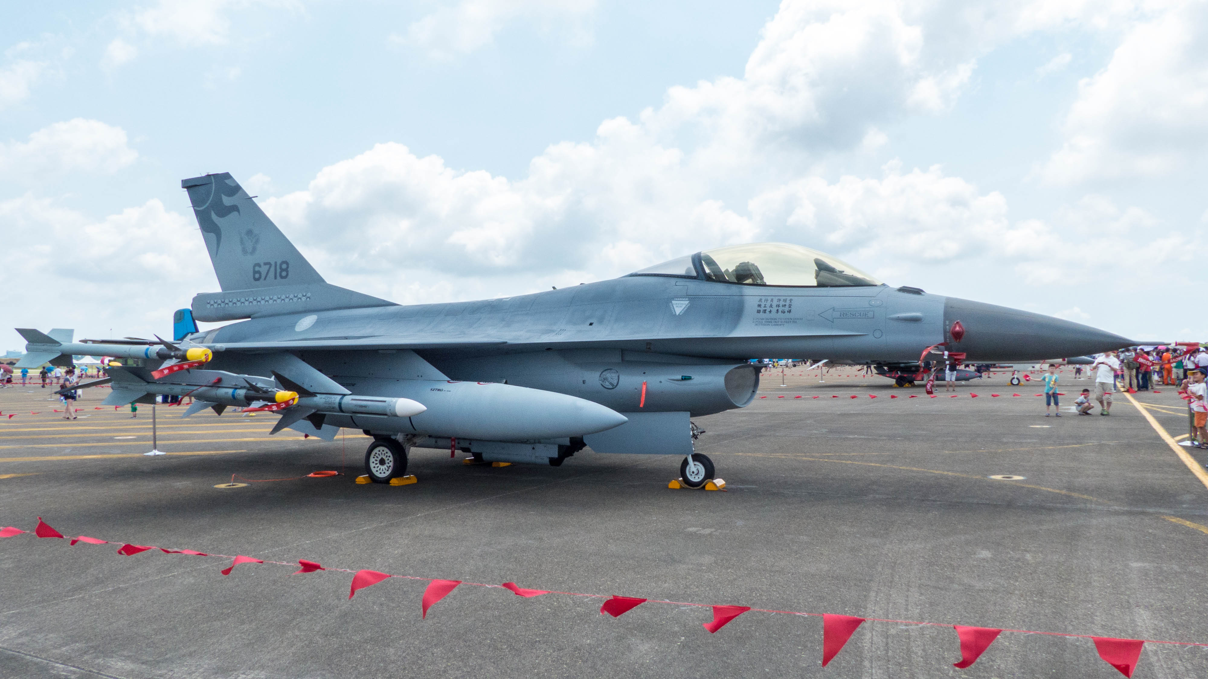 2014年空軍清泉崗基地營區開放，停機坪靜態展示的401聯隊F-16A 6718右前方。